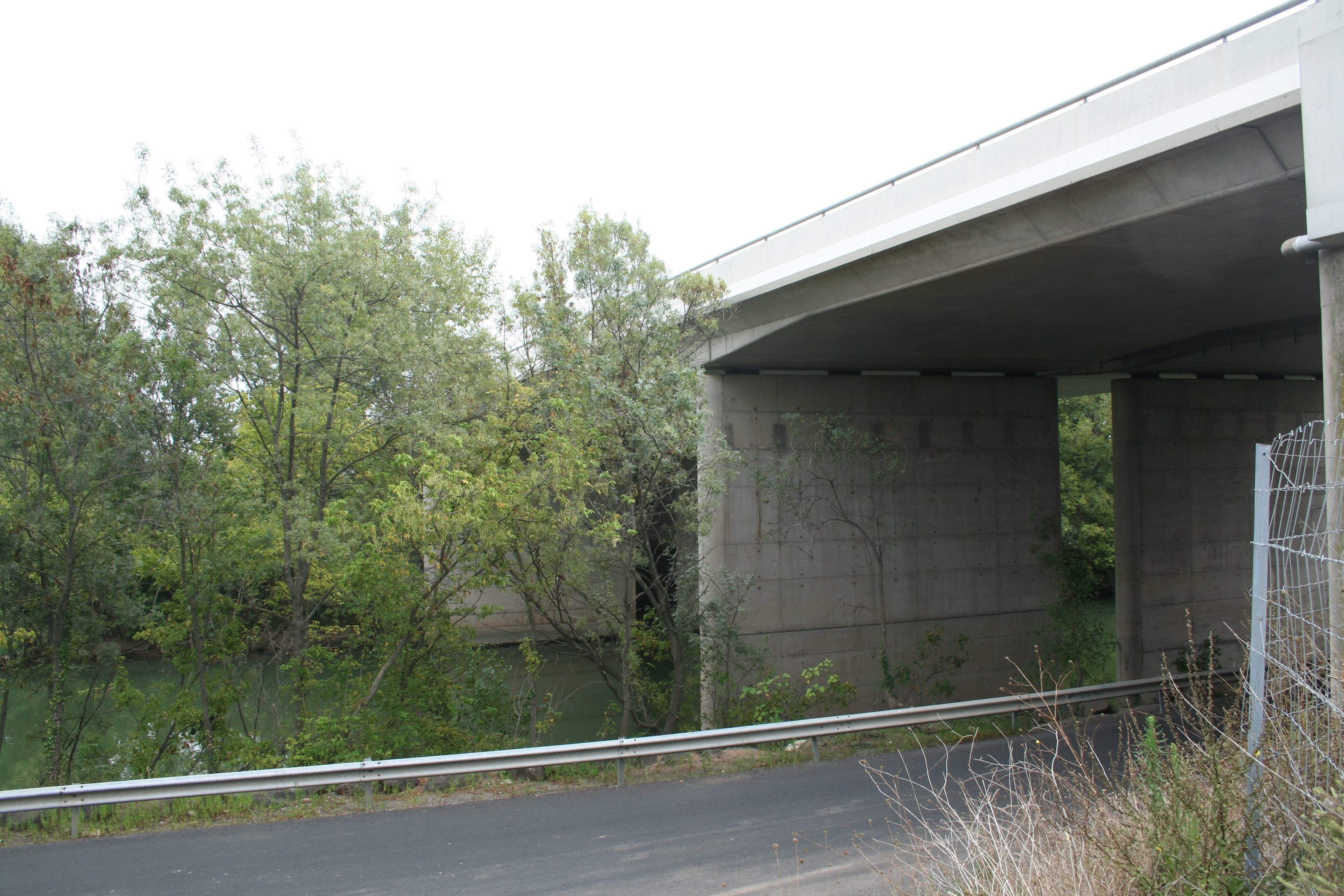 Bessan (Hérault) - pont permettant à l'autoroute A9 de franchir l'Hérault